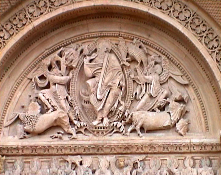 Abtei Saint-Fortunat, Charlieu, Burgund